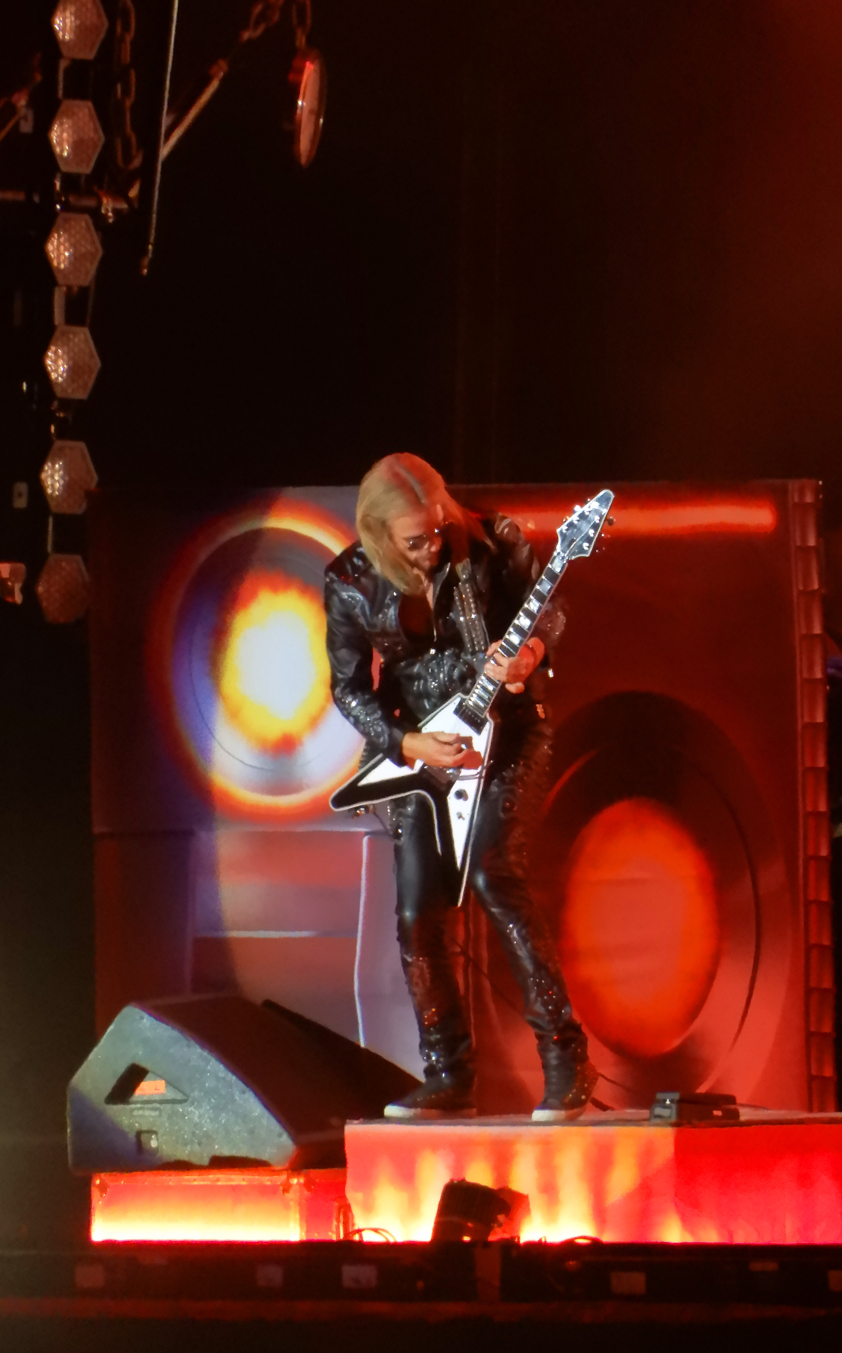 Richie Faulkner (Judas Priest) au Hellfest 2018 .